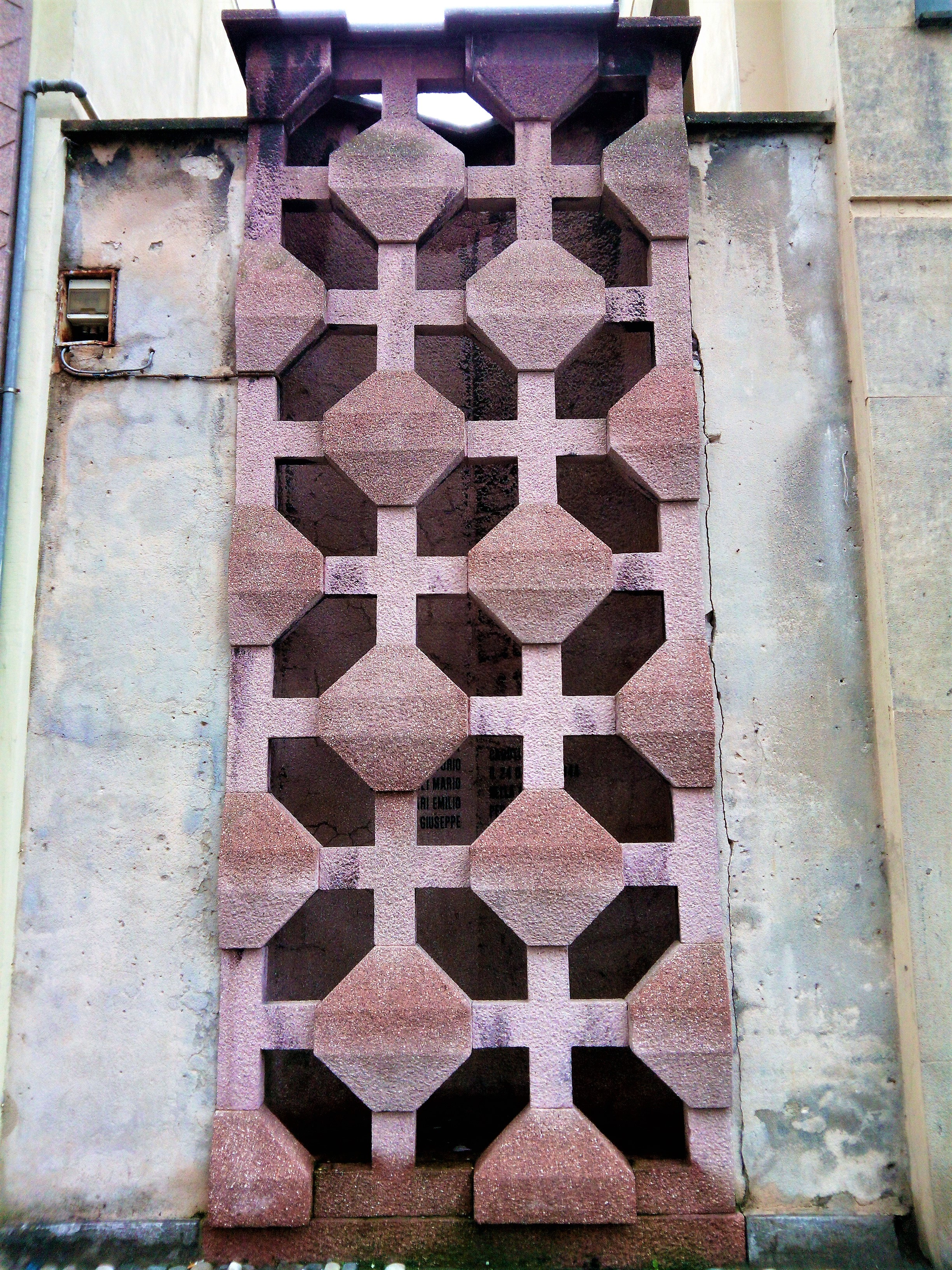 La foto descrive il sacello commemorativo dell'uccisione di partigiani presente a Novara in piazza Cavour